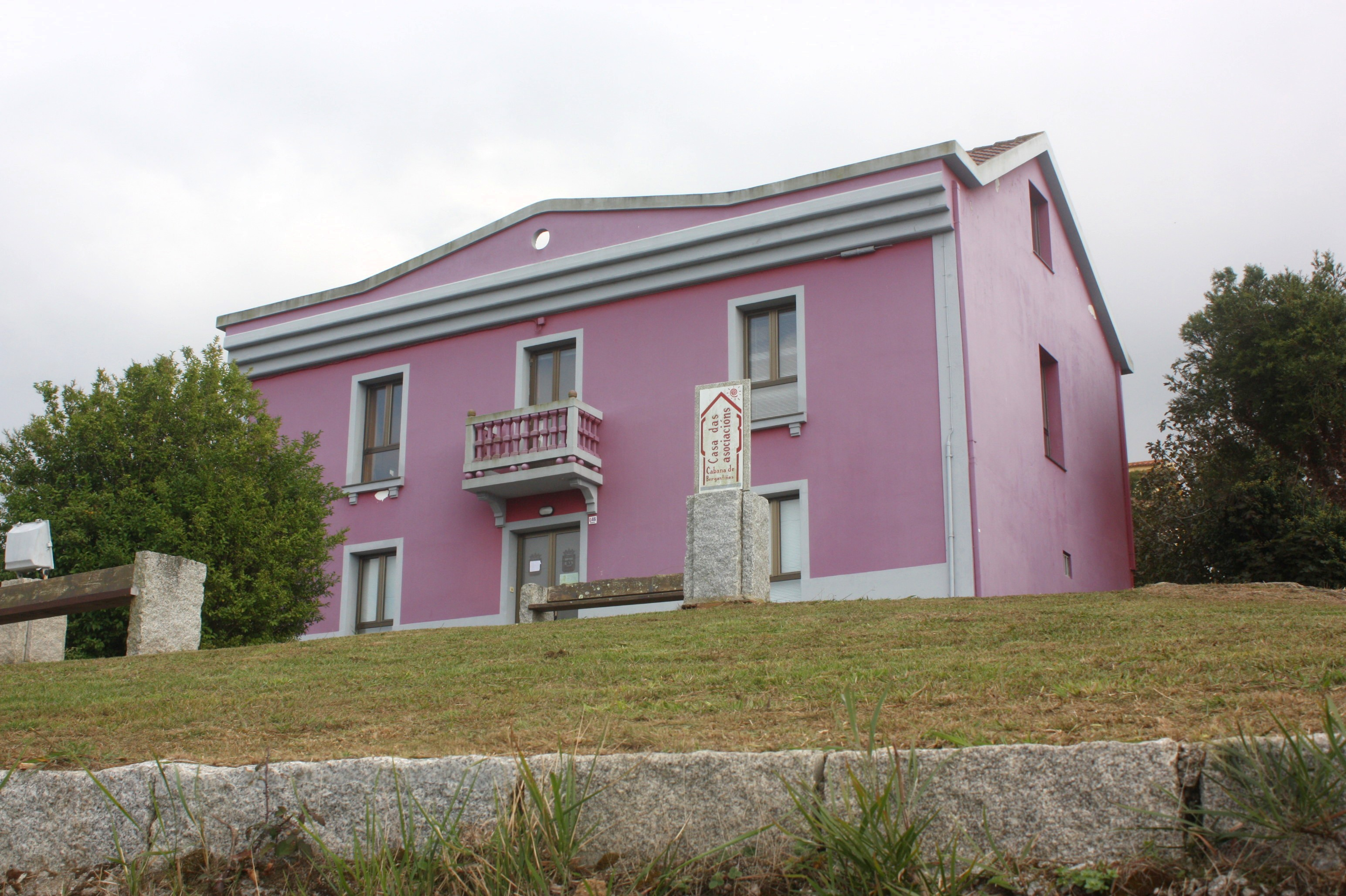 Casa das asociacóns no lugar da Áspera en Cesullas, A Áspera, Cesullas, Cabana de Bergantiños (Cabana de Bergantiños)